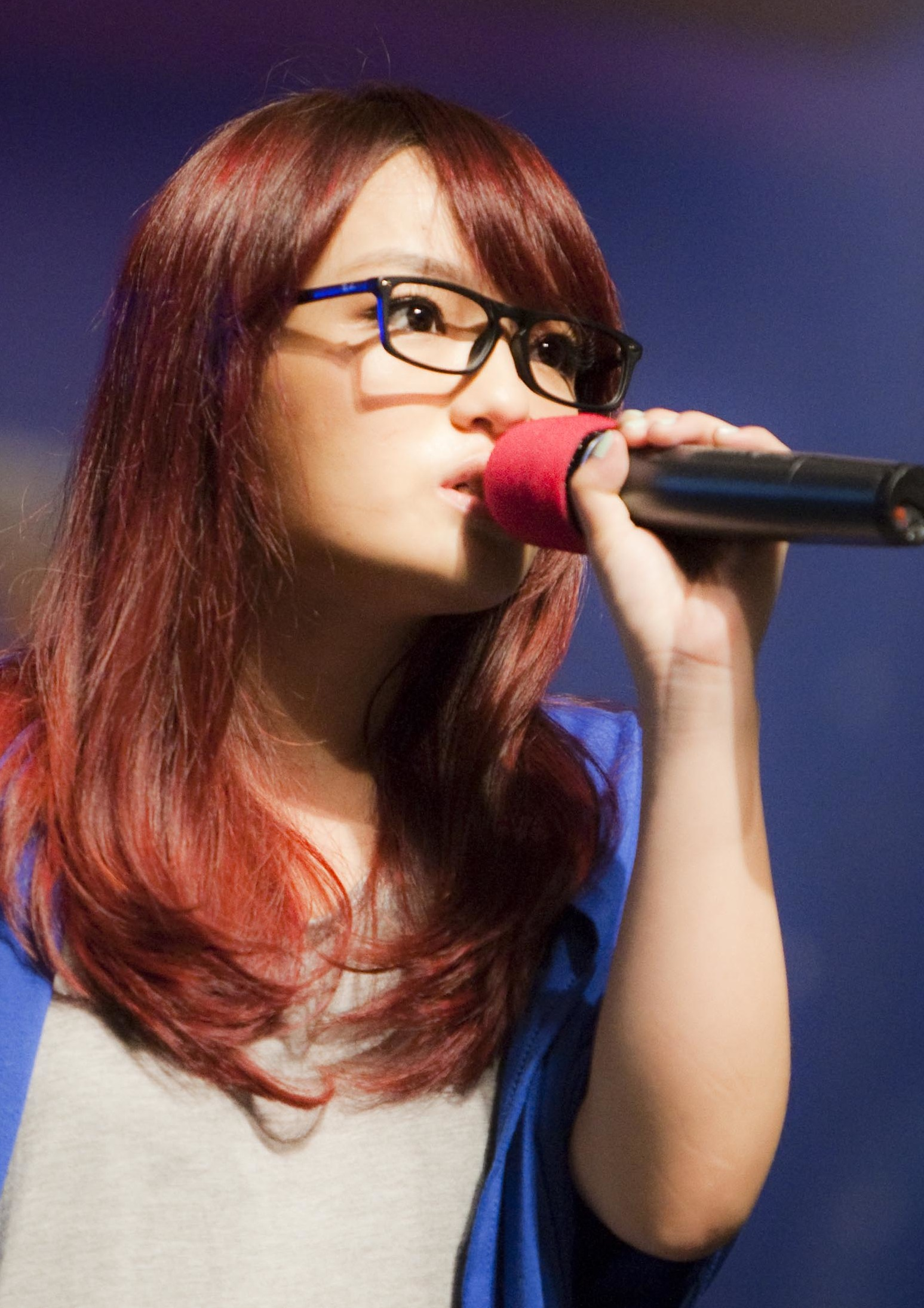 20110927 杭州搜狐音樂會-徐佳瑩-彩排